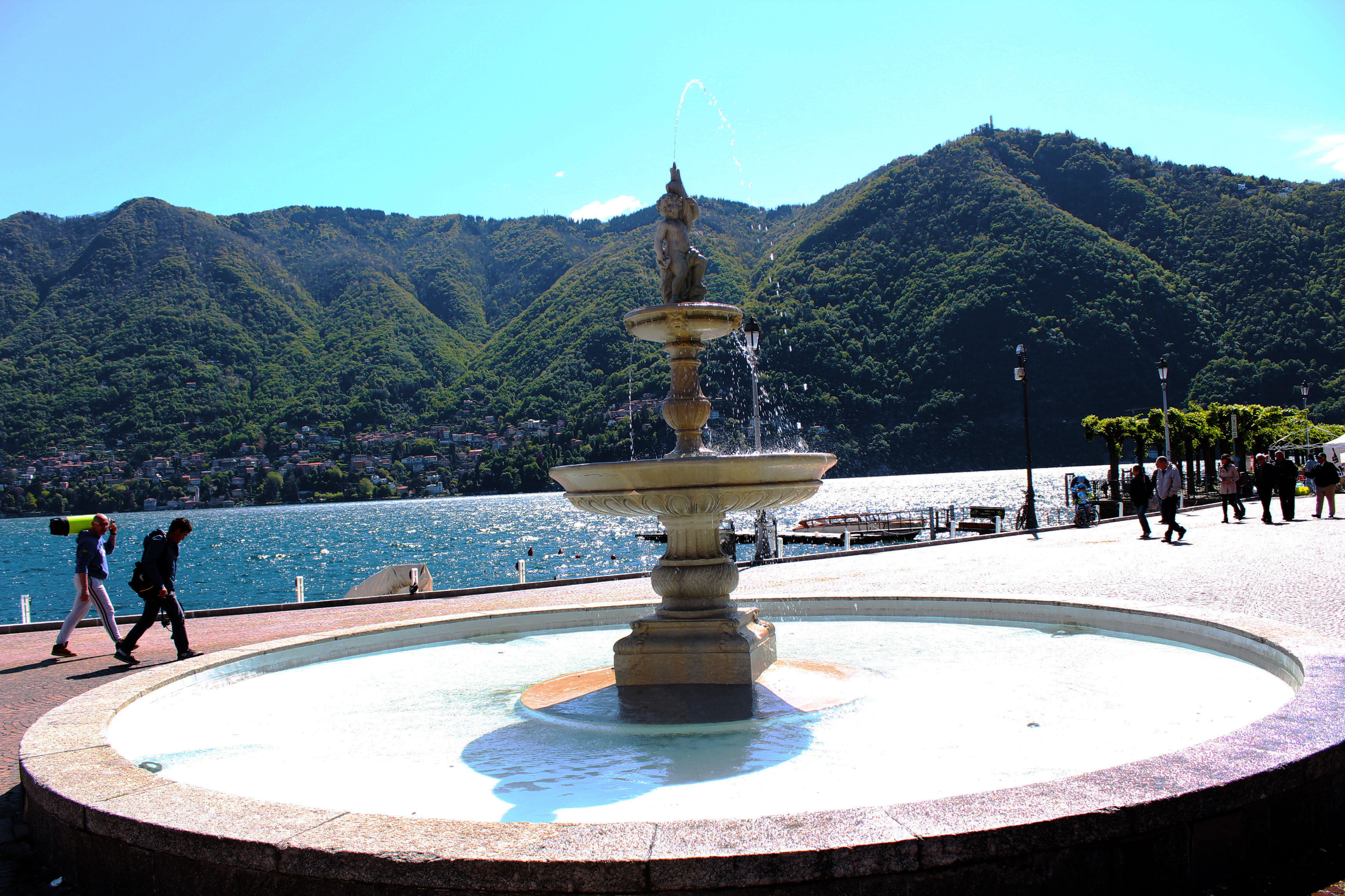 Fontana di Cernobbio This is a photo of a monument which is part of cultural heritage of Italy.